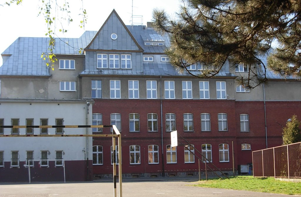 Budynek gimnazjum nr 22, dawna szkoła podstawowa nr 11 (1894, nadbudowa 1912-1913) - ul. gen. H. Dąbrowskiego 8 w Bydgoszczy